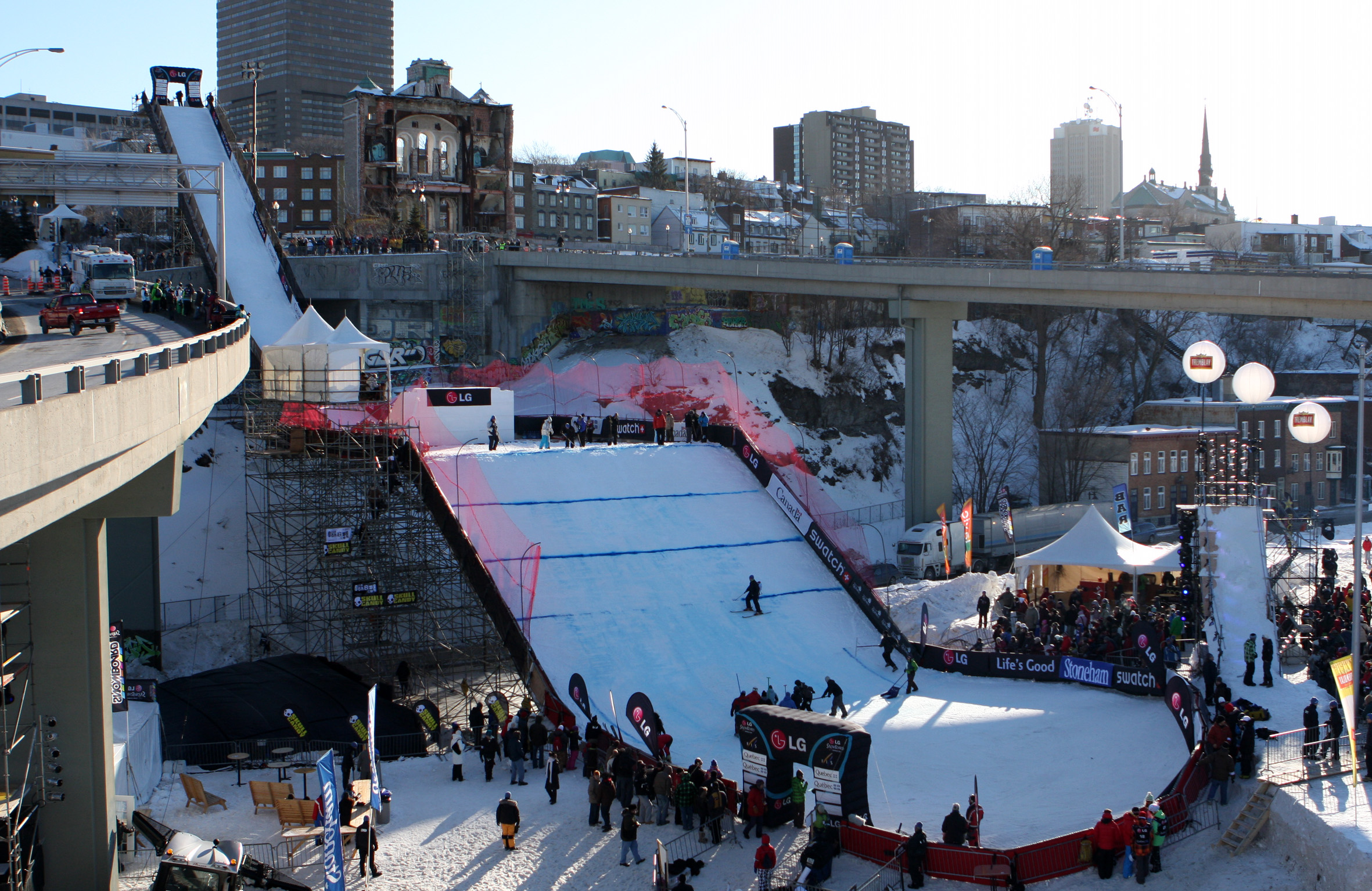 Quebec_BA_Venue